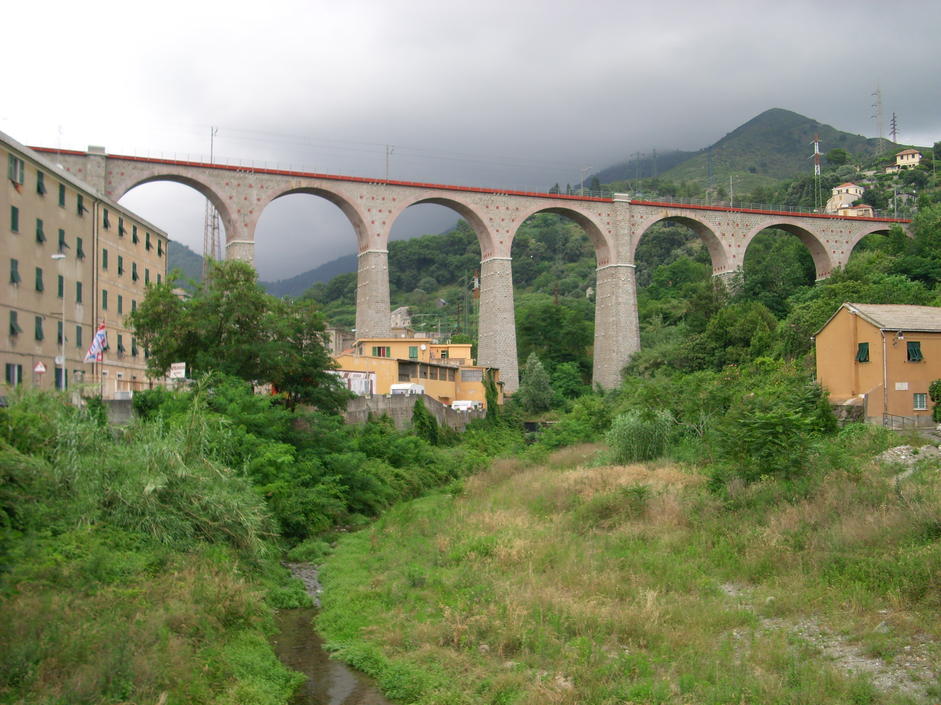 Il torrente Chiaravagna e il ponte ferroviario della linea Genova-Ovada-Acqui T. in localita' Panigaro